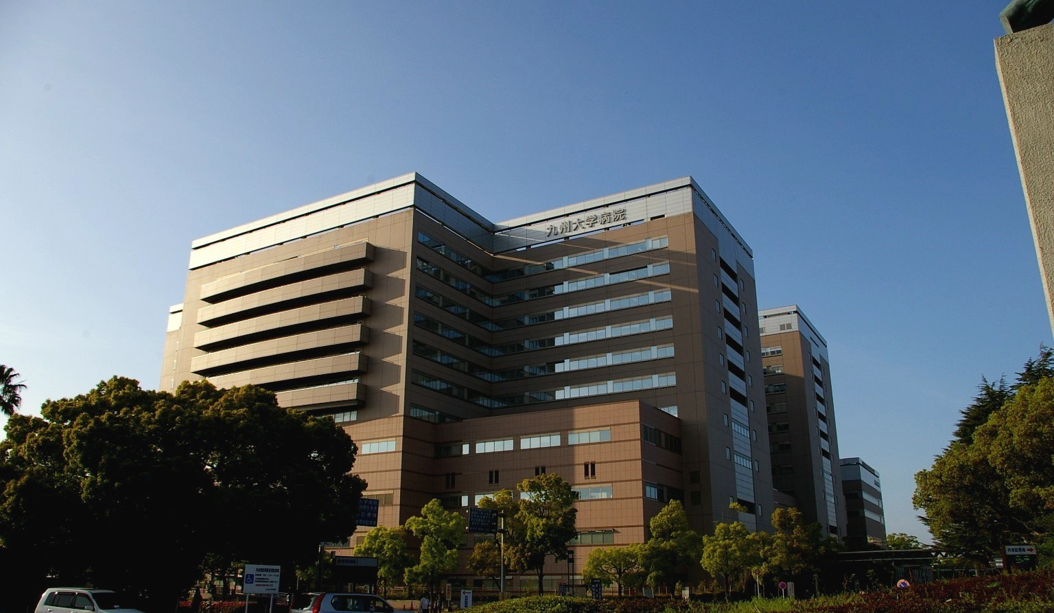 福岡市内で火国男児 (talk)が撮影。画像処理を施す。